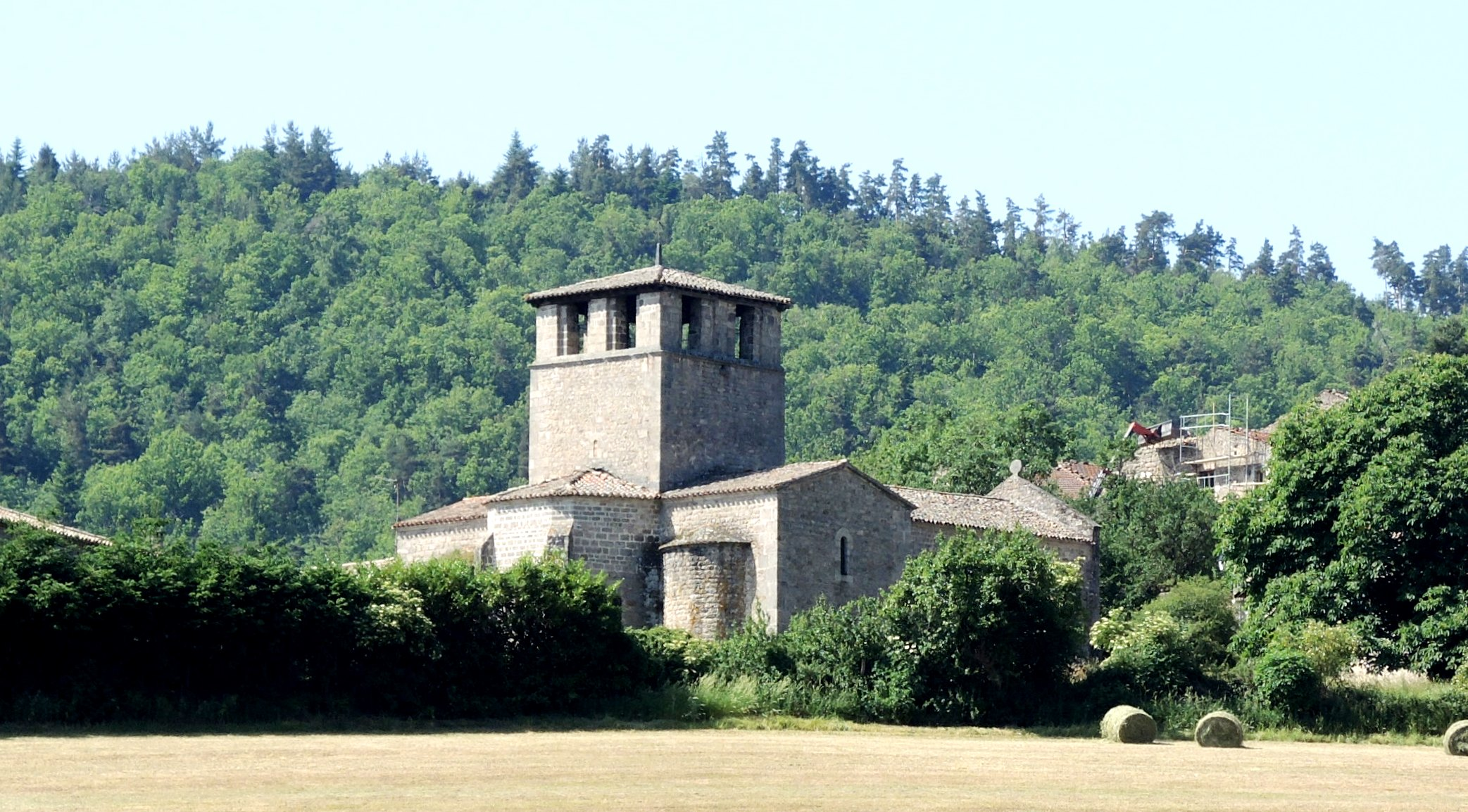 Veyrines St-Symphorien de Mahun